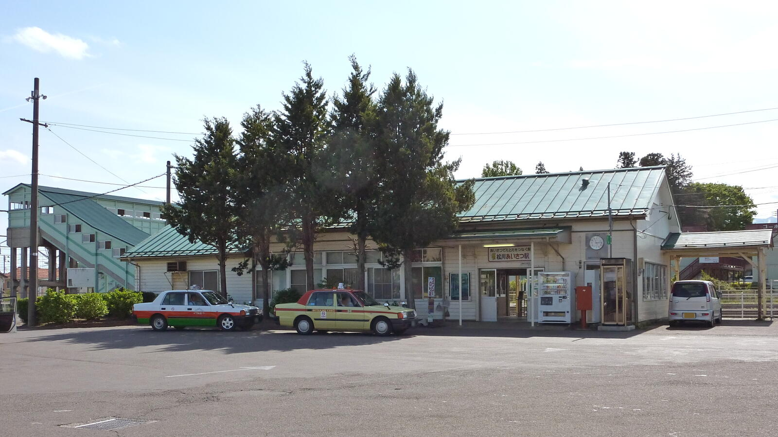 東北本線松川駅（駅舎）